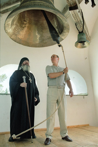 КАРЕЛИЯ. С игуменом Валаамского Спасо-Преображенского монастыря архимандритом Панкратием во время осмотра обители.